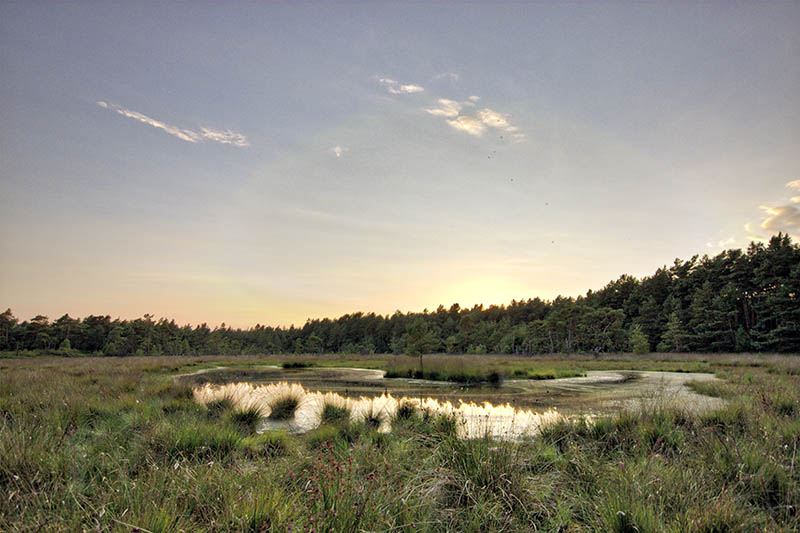 Feuchter Teil des Moores im Naturschutzgebiet „Heilsmoor“ (NSG LÜ 077) im Landkreis Osterholz, Niedersachsen